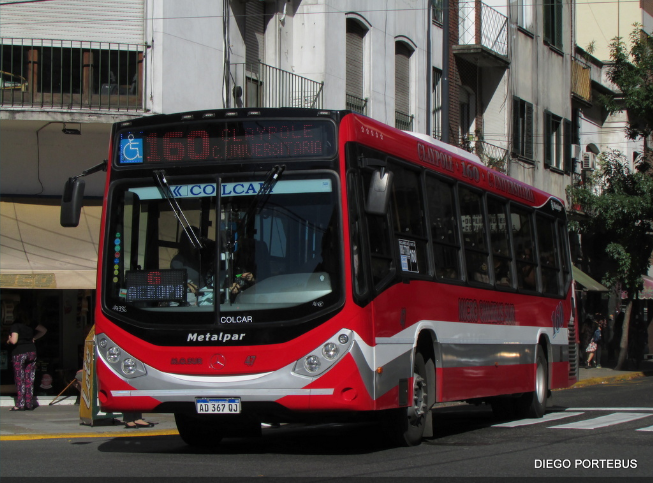 Linea Nacional que recorre CABA y el AMBA. Recorre desde Ciudad Universitaria hasta la Localidad Bonaerense de San Francisco de Asís, en el Partido de Almirante Brown.